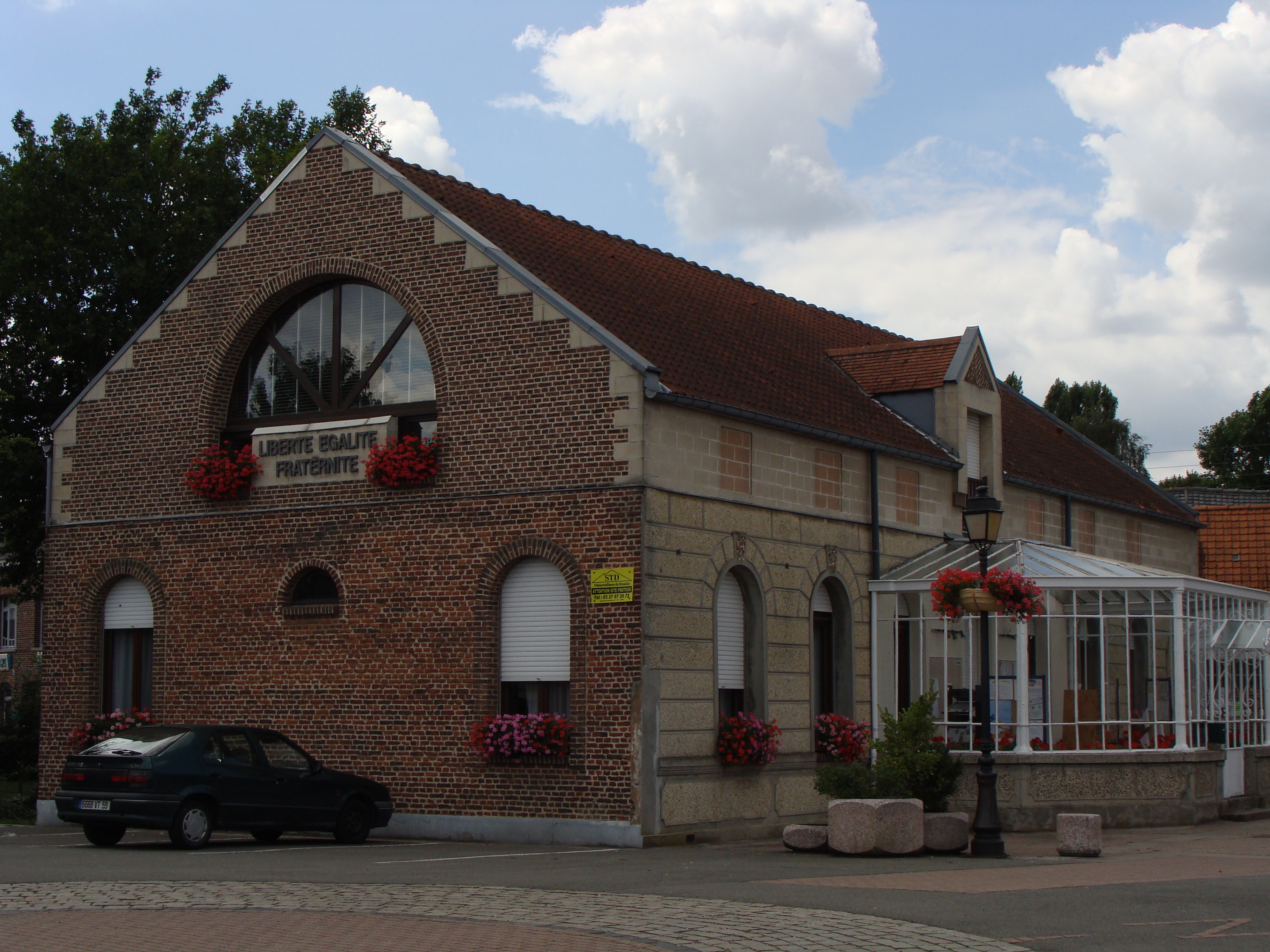 mairie de Flines-lez-Raches (département Nord de la France)